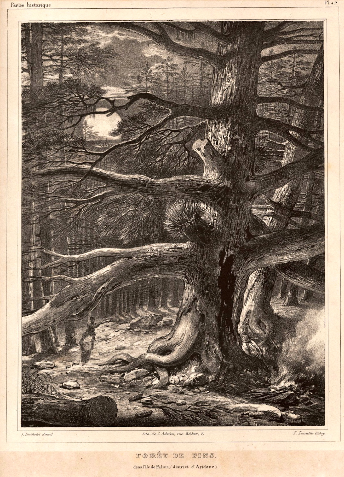 Litografía nº 42 del libro "Histoire naturelle des îles Canaries 1, 2. Les Miscellanées Canariennes. Planches." De Phillip Barker Webb y Sabin Berthelot. En el grabado se observa un pinar de pino canario en la isla de La Palma durante la luna llena. En el fondo, a la izquierda, se ve a un leñador talando un pino, mientras que en la derecha se observa a otro durmiendo junto a una hoguera, con un sombrero tapando su cara y envuelto en una capa.